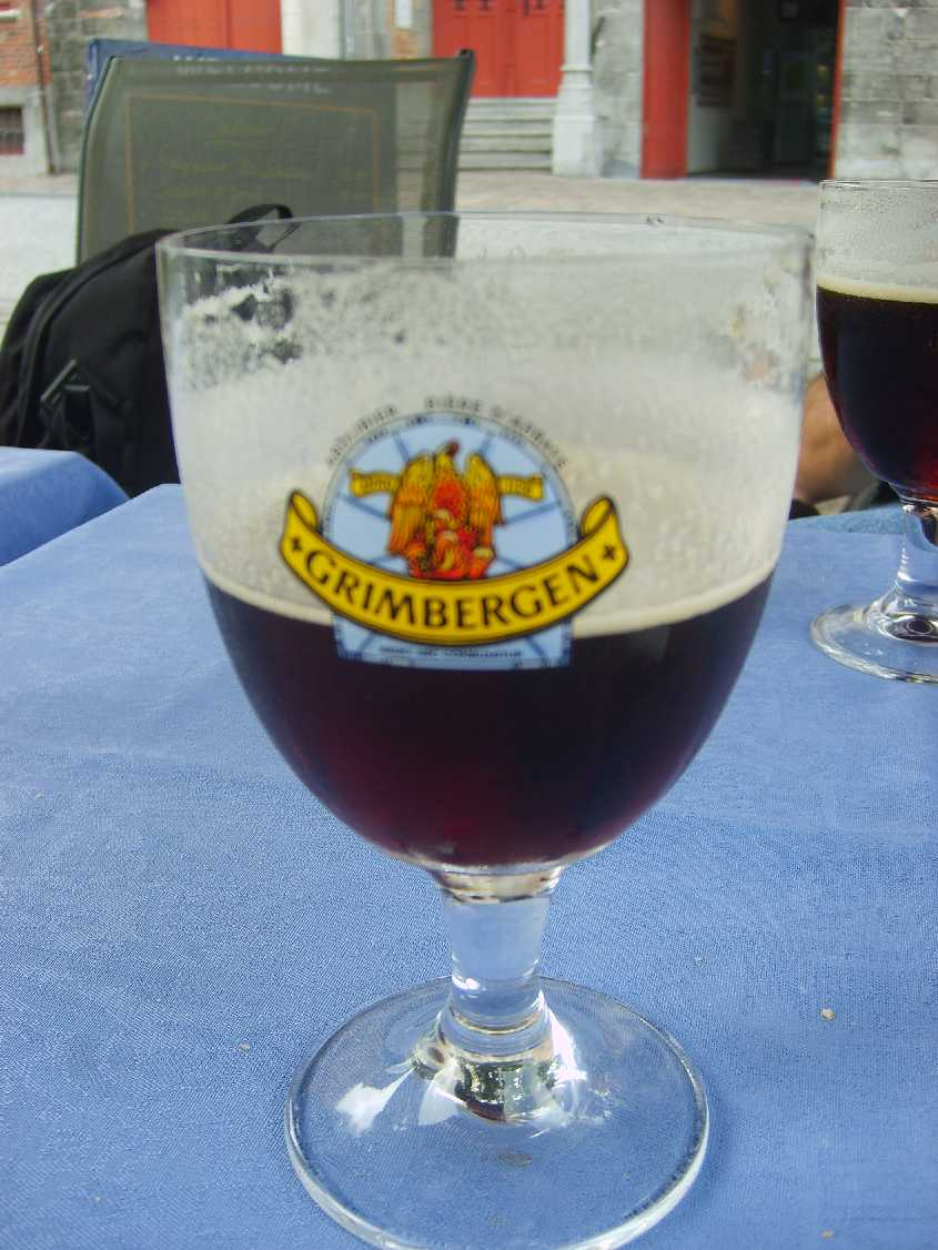 Imagen de la cerveza Grimbergen servida de Barril en su propio vaso en Brujas (Bélgica)